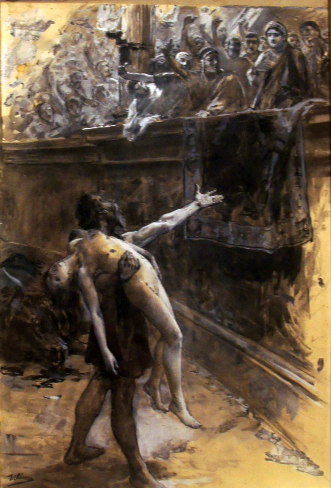 Ursus (Ulpiano Checa), 60,2 X 45,5 cm. carboncillo , gouache y tinta sobre papel. 1901. Firmado ángulo inferior izquierdo.